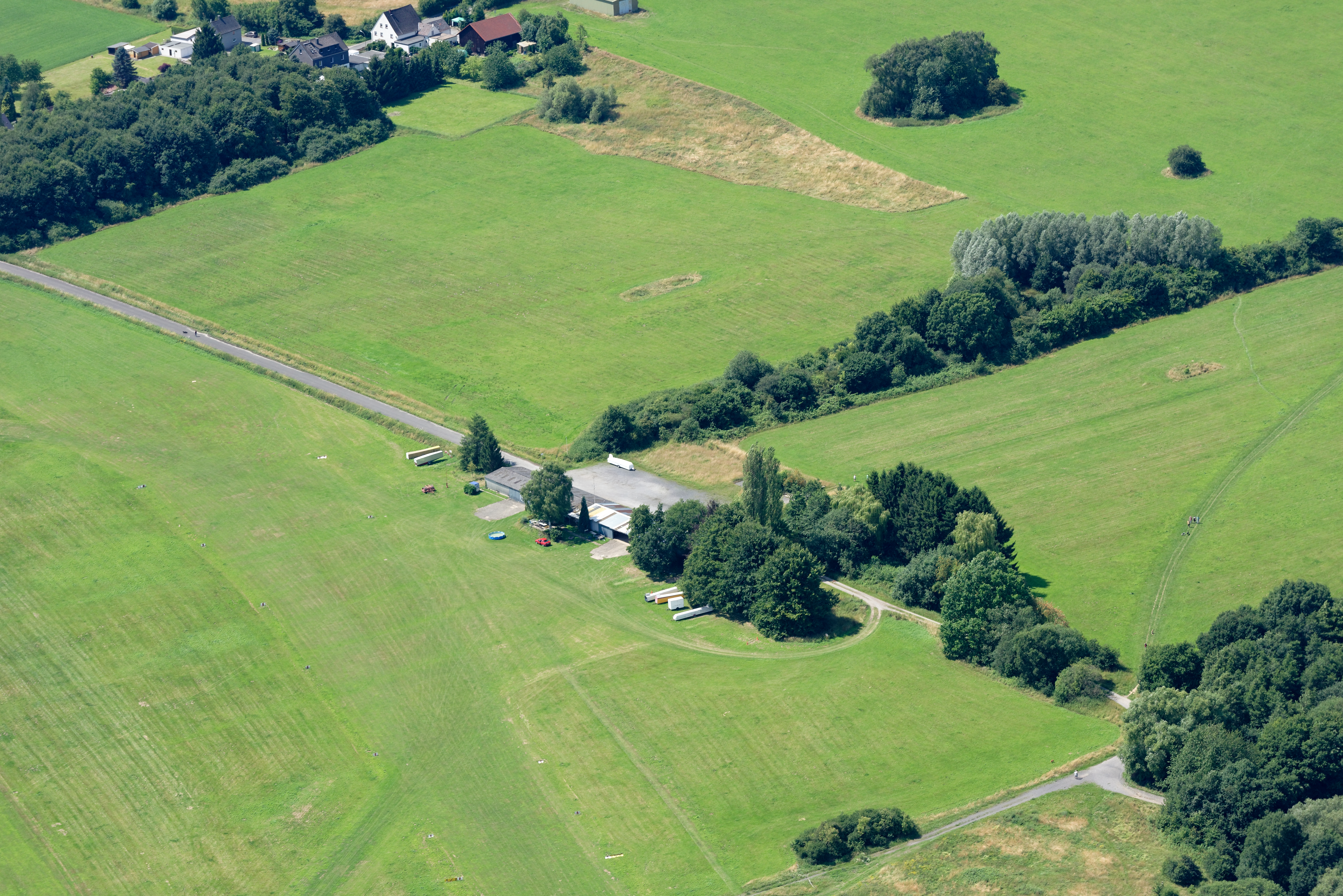 Luftaufnahme: Flugplatz Hengsen-Opherdicke, Blick Richtung Westen, Nordrhein-Westfalen